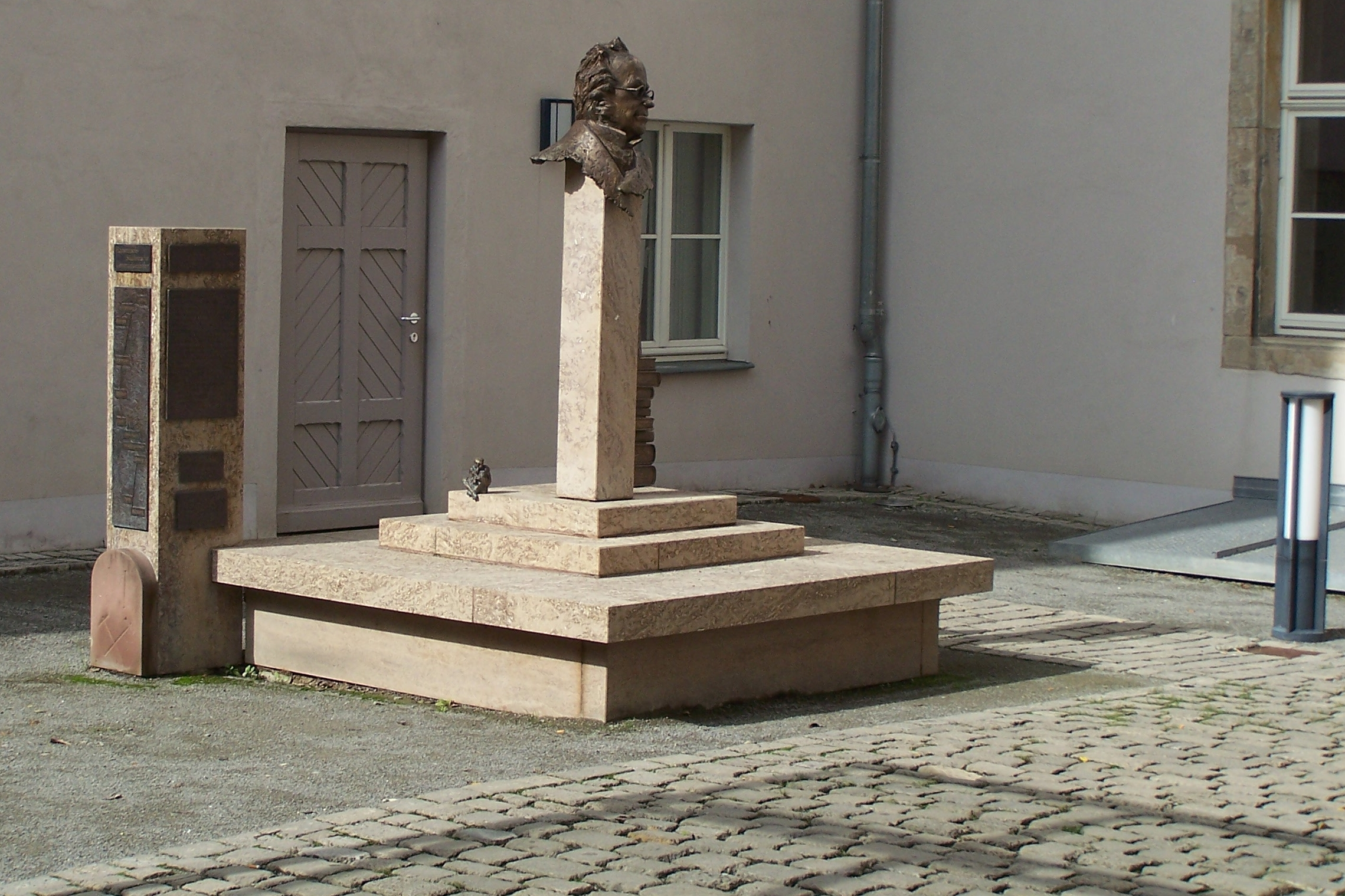 Gesamtansicht des Denkmals.